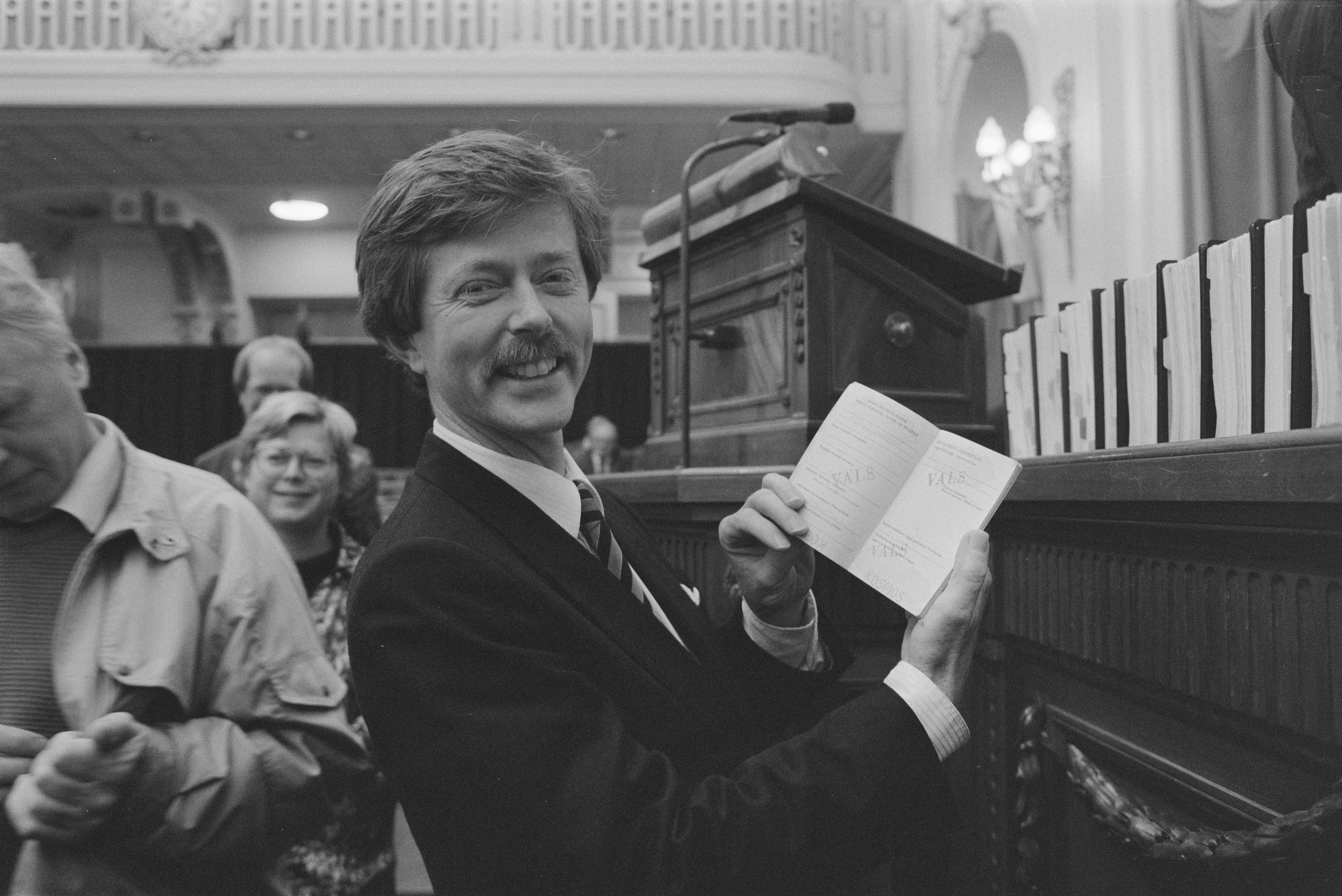 Collectie / Archief : Fotocollectie Anefo Reportage / Serie : [ onbekend ] Beschrijving : Tweede Kamer ; Voorhoeve met vals paspoort Datum : 13 september 1988 Trefwoorden : ministers, paspoorten, politiek Persoonsnaam : Voorhoeve, Joris Fotograaf : Croes, Rob C. / Anefo Auteursrechthebbende : Nationaal Archief Materiaalsoort : Negatief (zwart/wit) Nummer archiefinventaris : bekijk toegang 2.24.01.05 Bestanddeelnummer : 934-3127